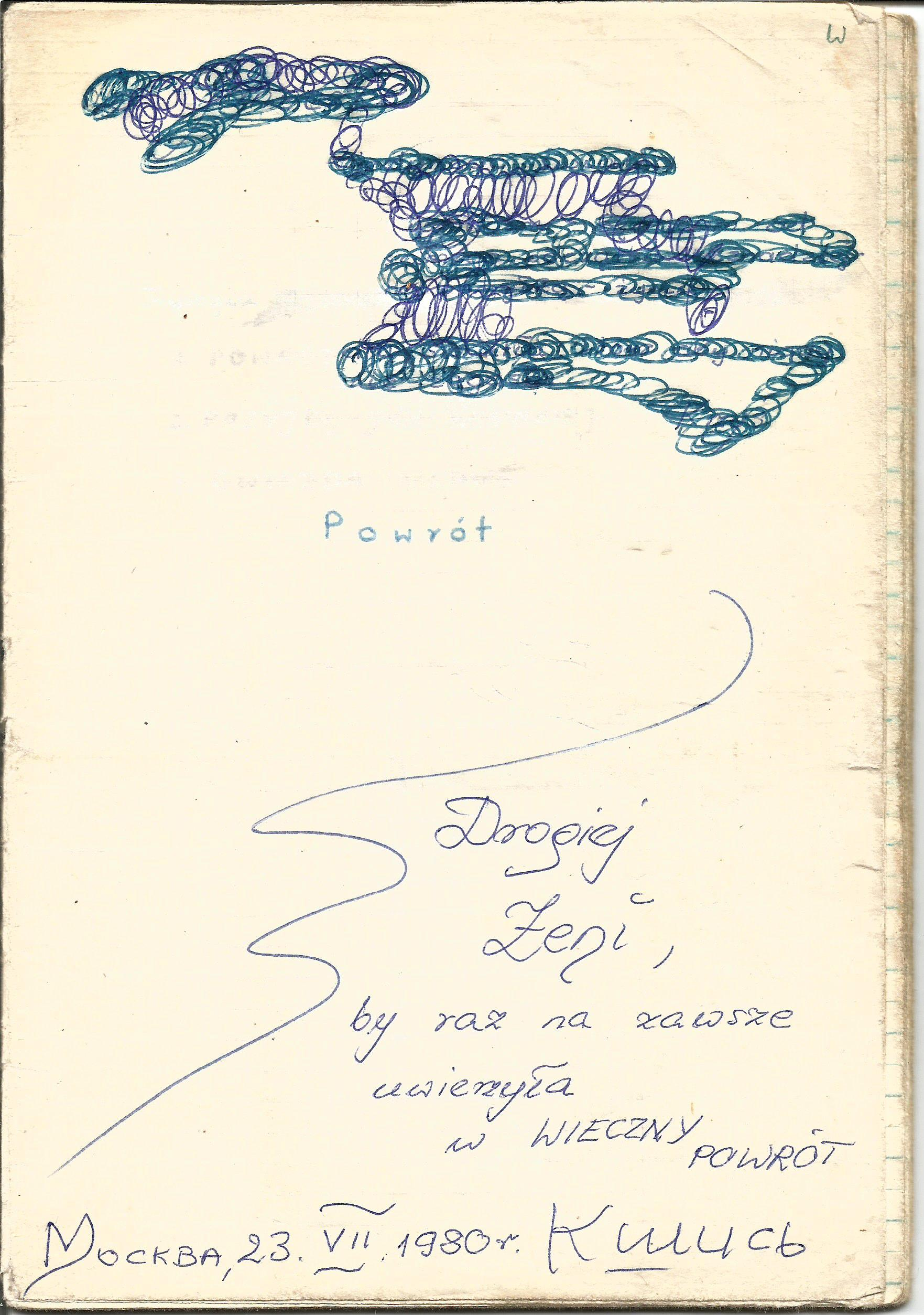 ПЬЕСА 1